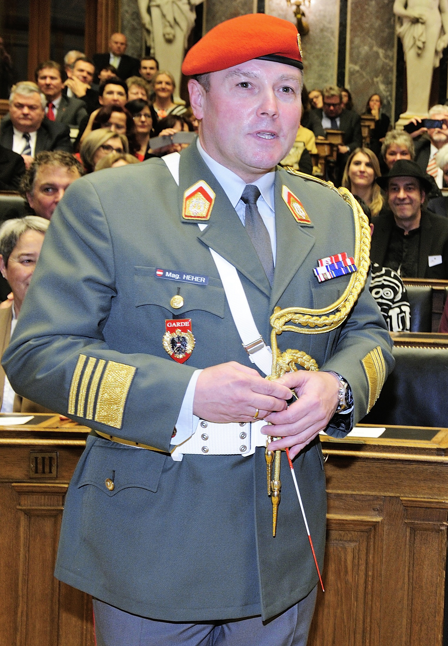 Militärkapellmeister Bernhard Heher und Gardekommandant Stefan Kirchebner übergeben die Partitur des "Barbara-Prammer-Marsches" an Barbara Prammer.